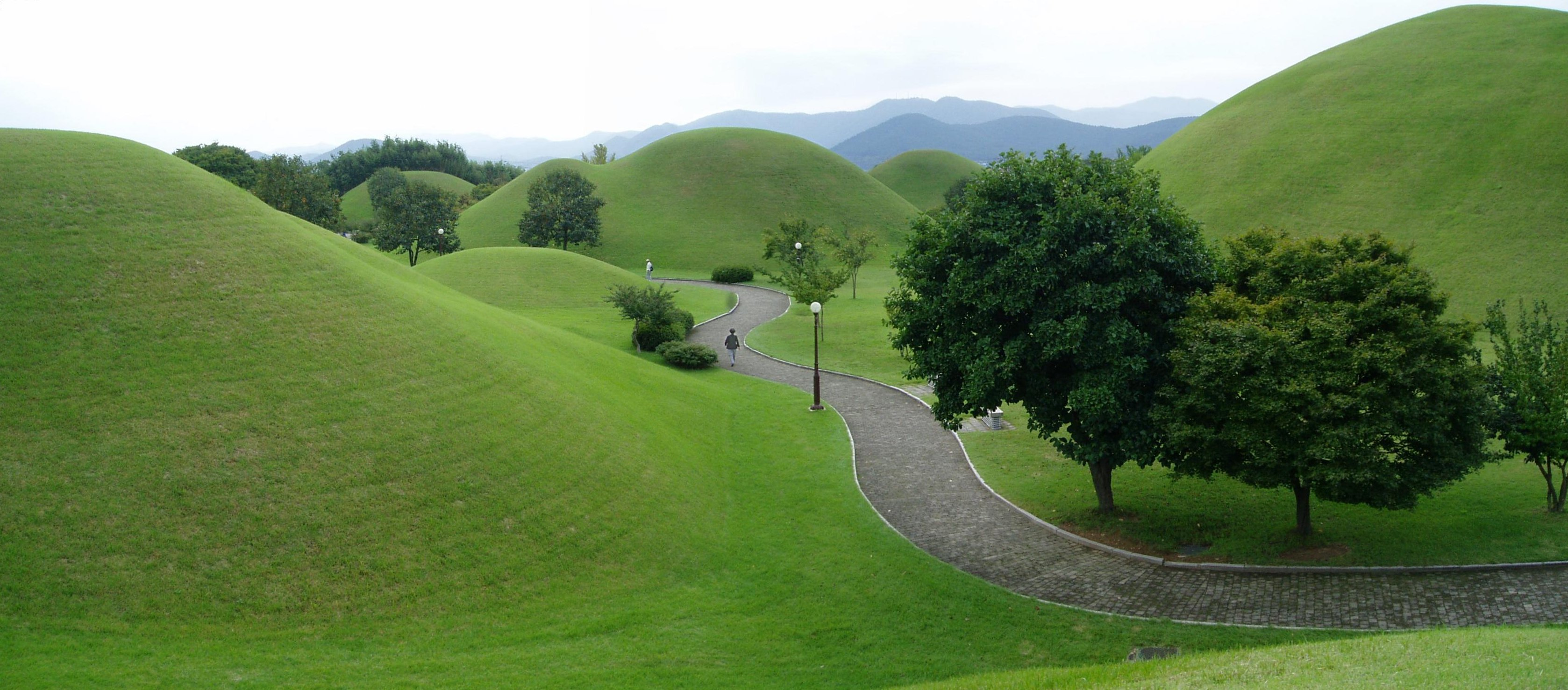 Gyeongju - King Tomb Park